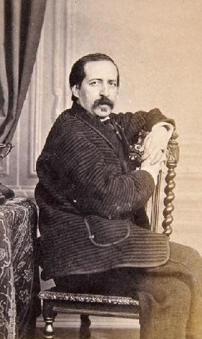 Germán Hernández Amores, fotografía de J. Laurent. Museo de Historia de Madrid.